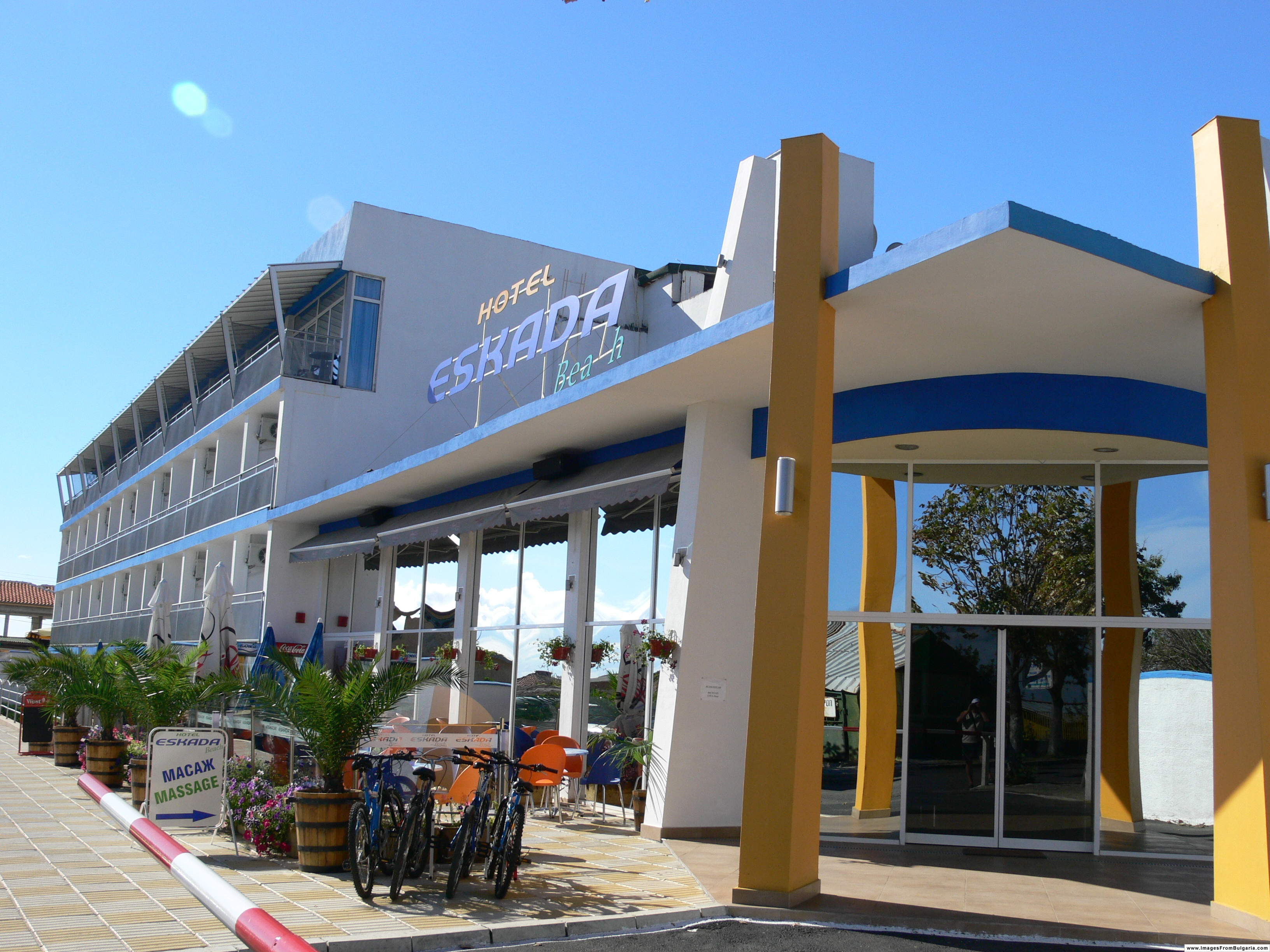 Ahtopol, Bulgaria. Author: Nenko Lazarov. Eskada Beach hotel